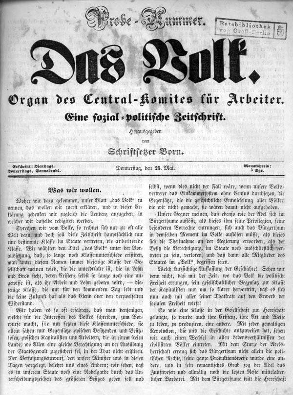 Zeitschrift "Das Volk" (Organ des "Zentralkomitees der Arbeiter" 1848)